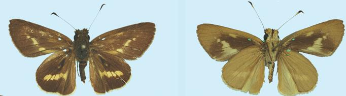 Pastria pastria upperside (left), underside (right)